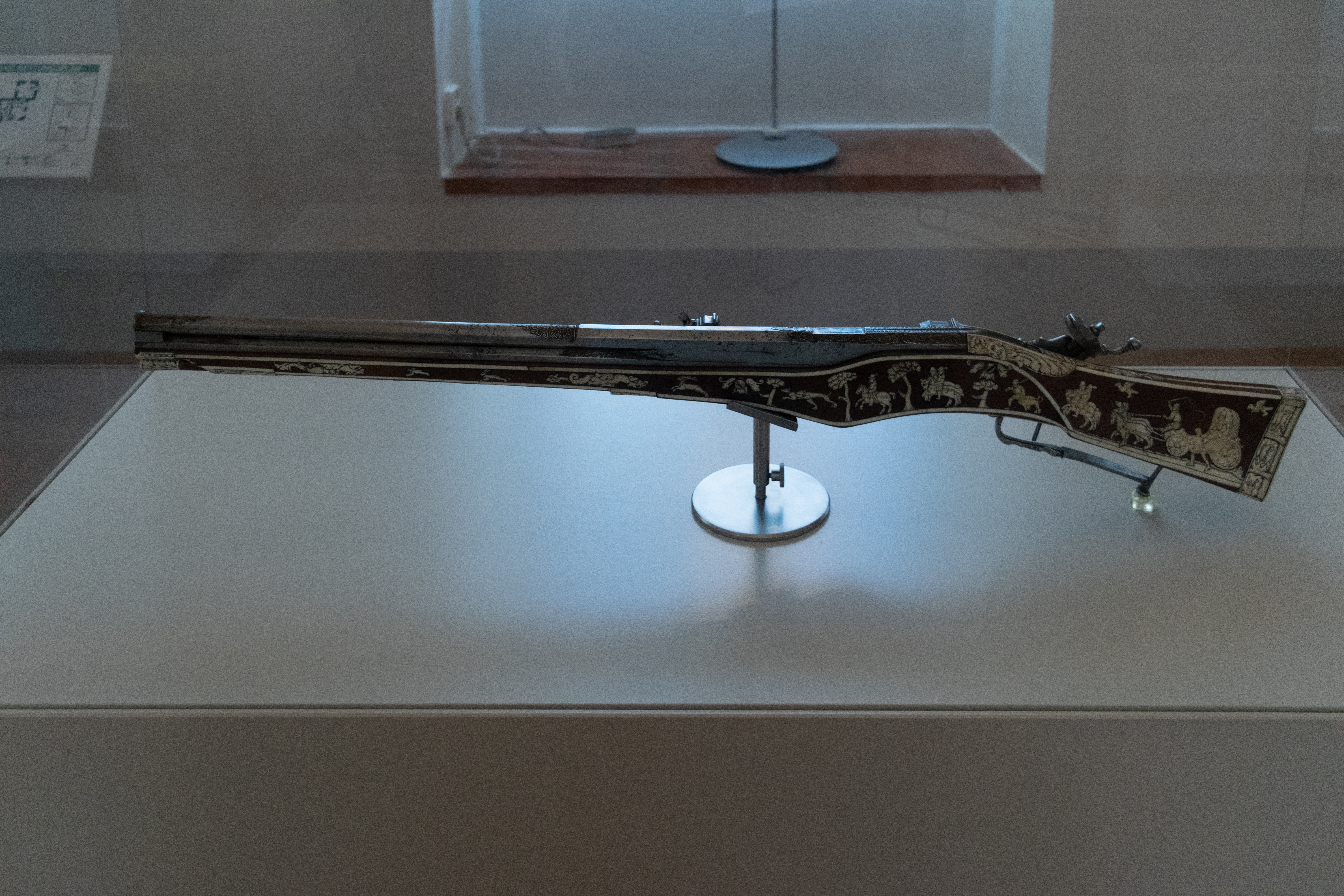 Glam on Tour Jagdschloss Grunewald, Berlin